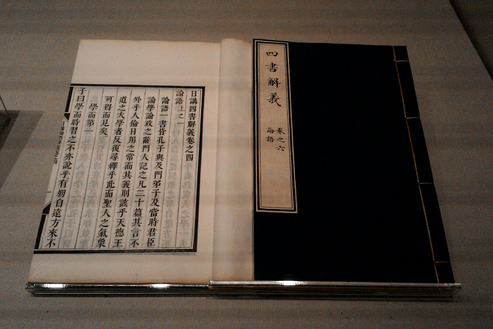 日講四書解義,台北市士林區陽明山次分區臨溪里